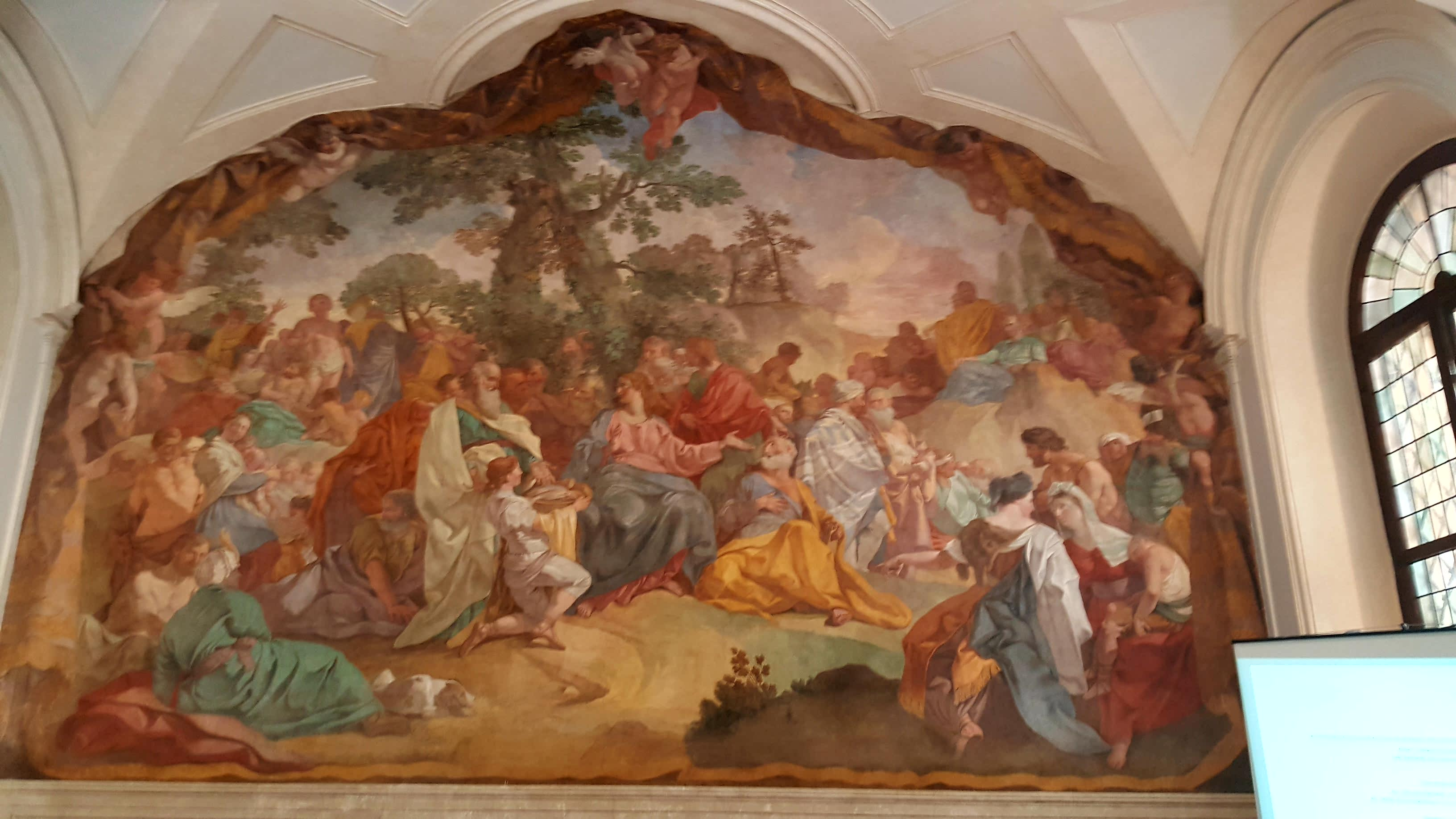 Affresco della sala Vanvitelli nella sede dell'Avvocatura Generale dello Stato.